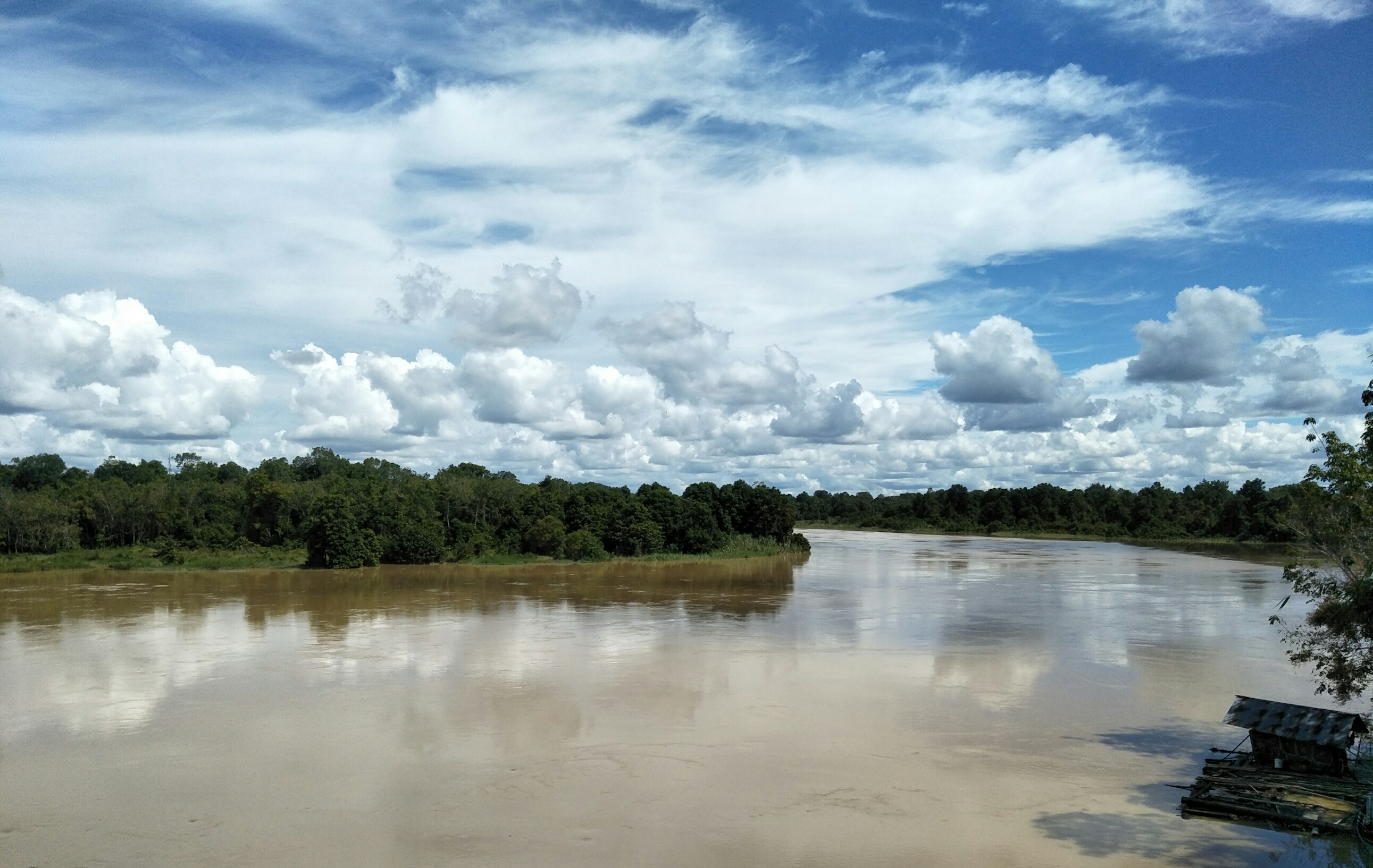 Perpaduan yang indah antara cerahnya langit, hijaunya hutan, dan cokelatnya sungai kahayan. Yeah, ini ada di Kab. Pulang Pisau, Kalteng (3)